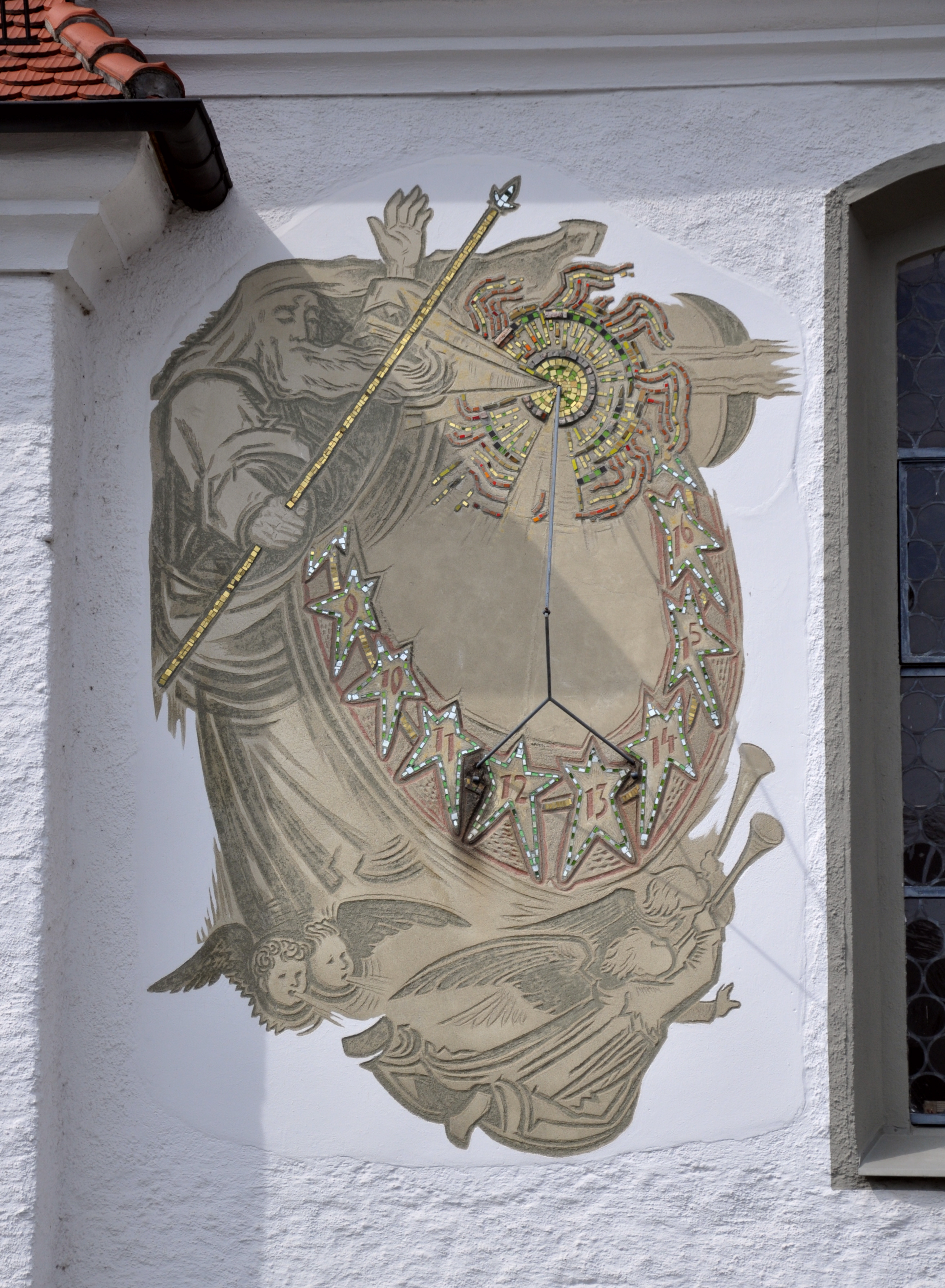 Friedrichshafen, Ortsteil Schnetzenhausen, Pfarrkirche St. Peter und Paul, Sonnenuhr von Alfred Vollmar (Leutkirch) in Mischtechnik (Sgraffito und Mosaik), 1959